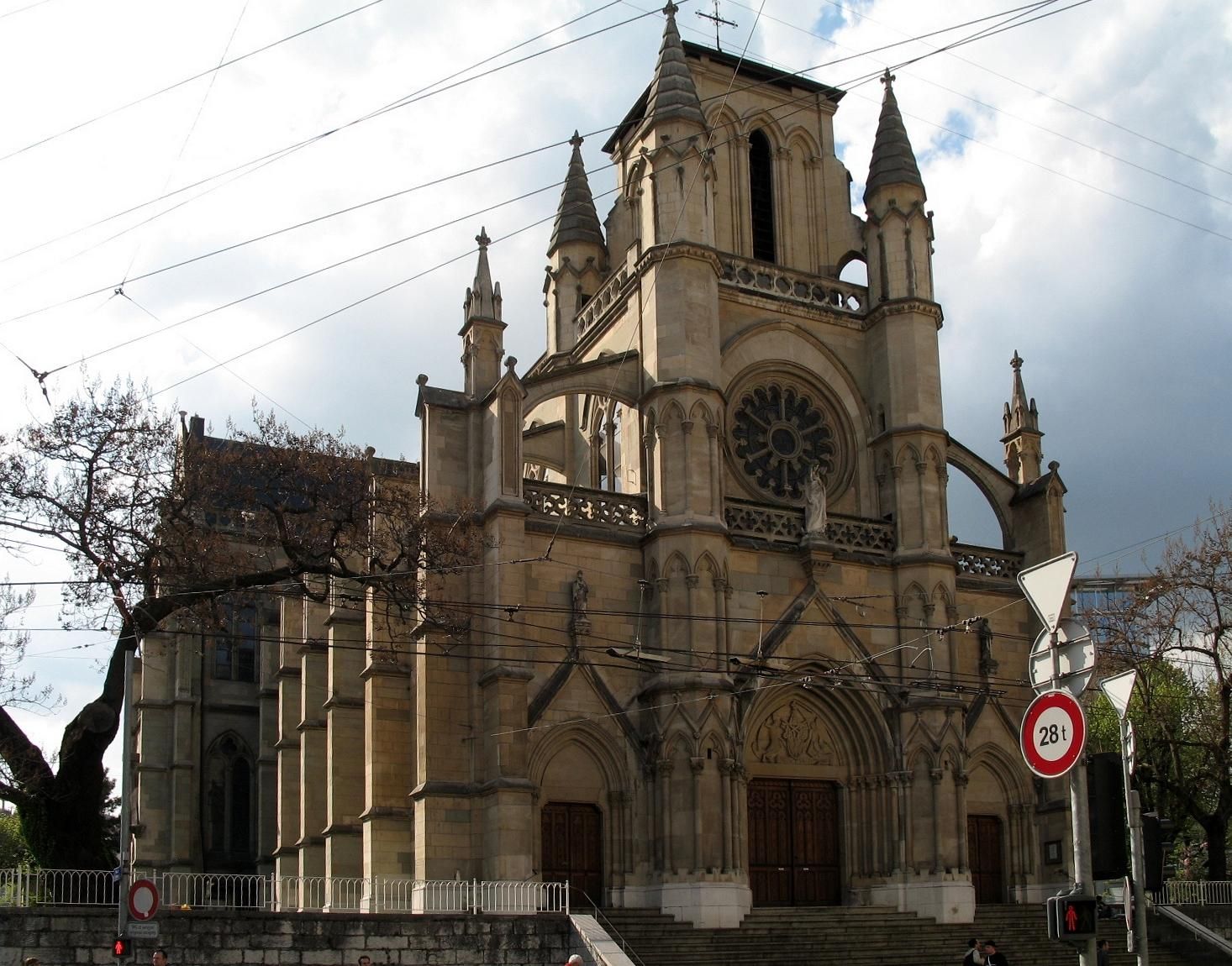 Église Notre-Dame à Genève, sur la place Cornavin